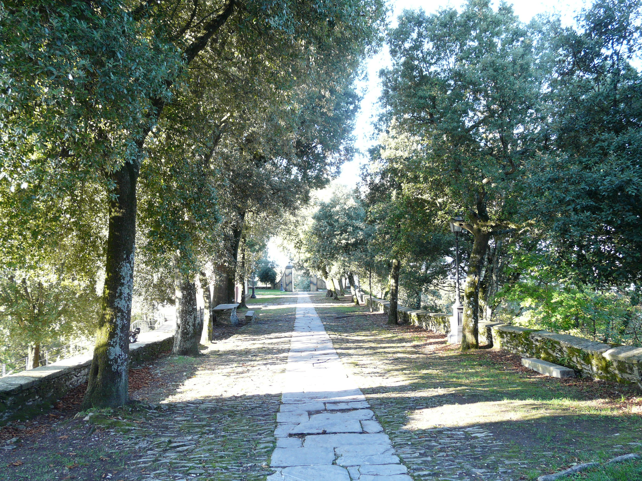 Viale alberato del Santuario di Nostra Signora di Montallegro, Rapallo, Liguria, Italia